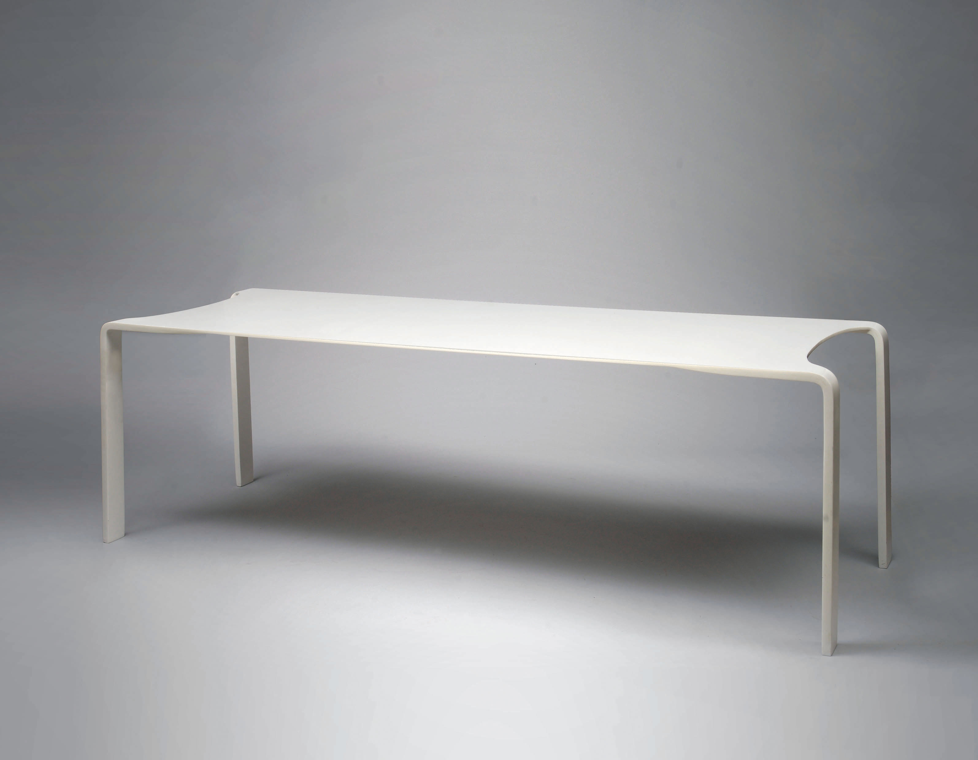 Première table en Corian© réalisée pour OVO editions en 2007.